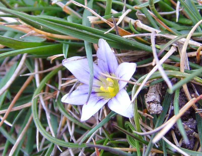 Romulea columnae, pointe du Van, Cléden, Finistère, France